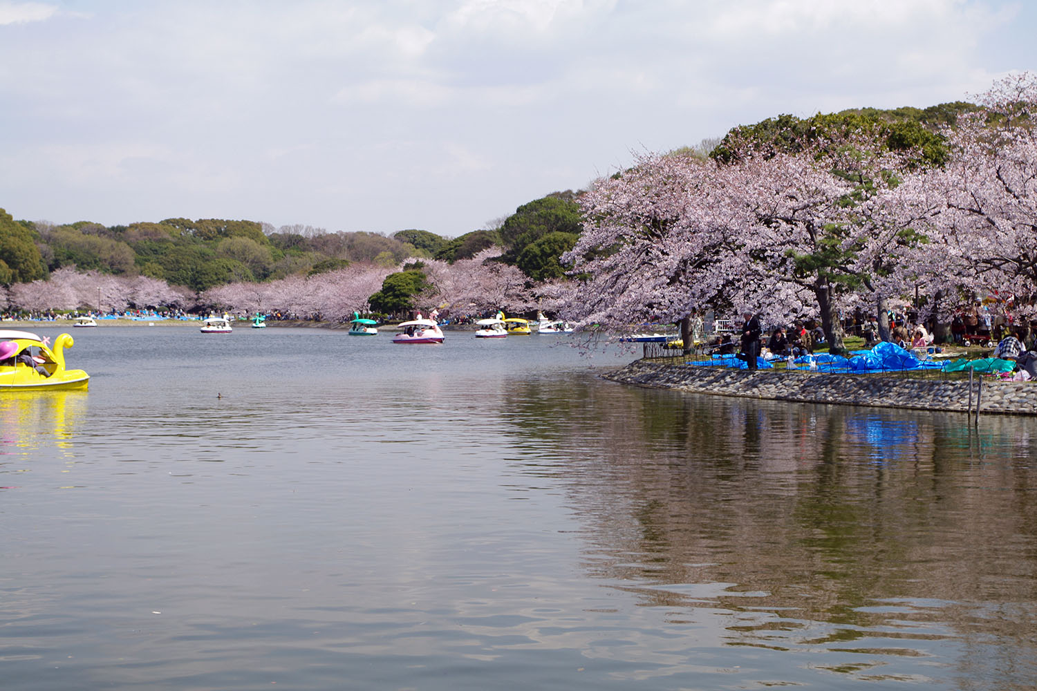 Gounoike and Sakura, Akashi park